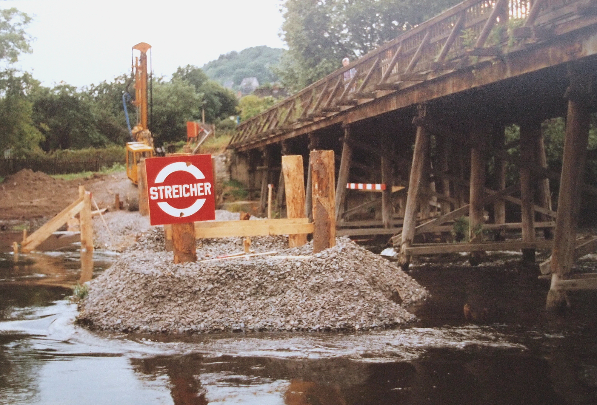 Baustelle der neuen Griesbrücke, daneben der Vorgängerbau